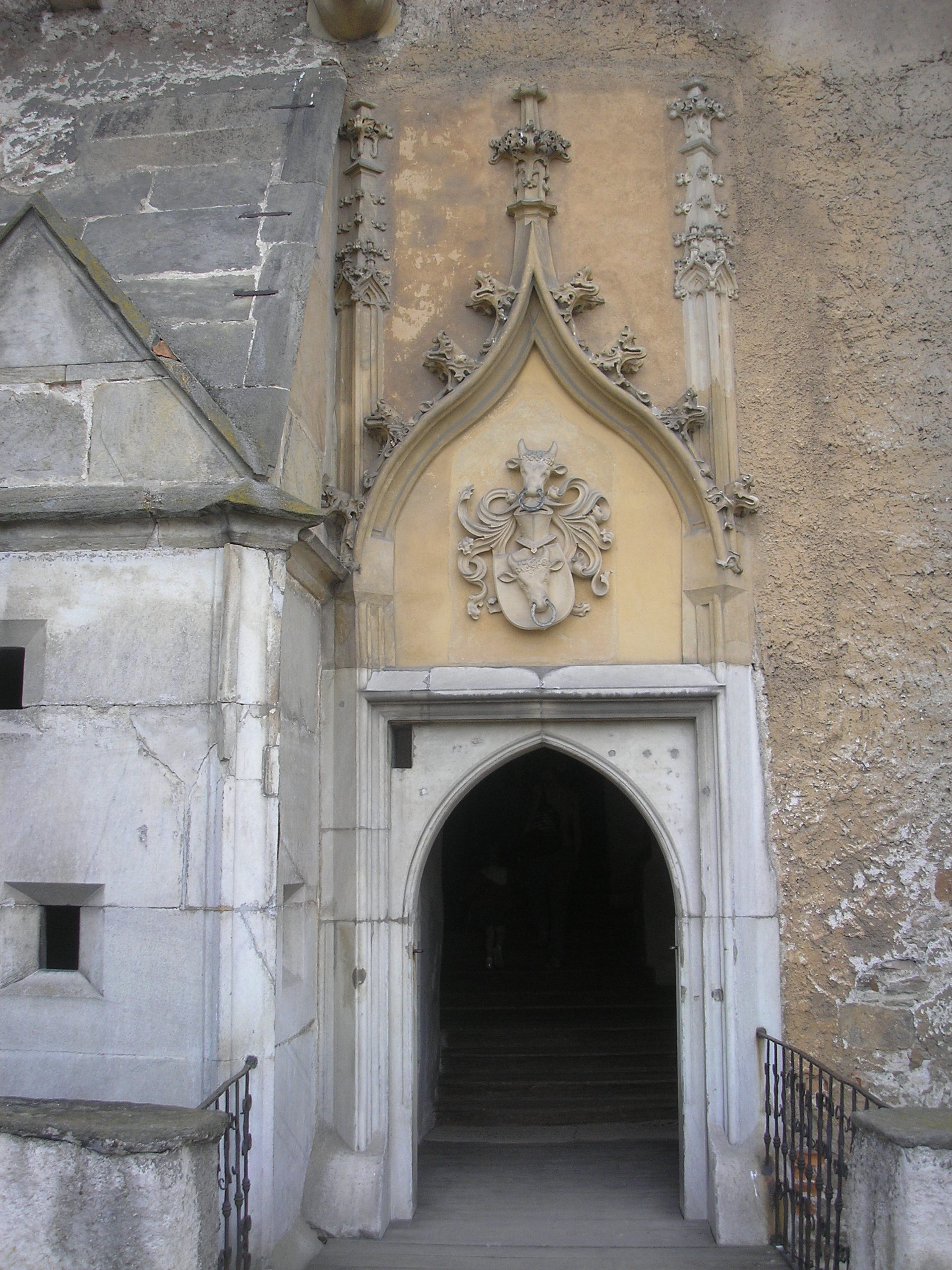 Pernstein Portal zum Burgpalast